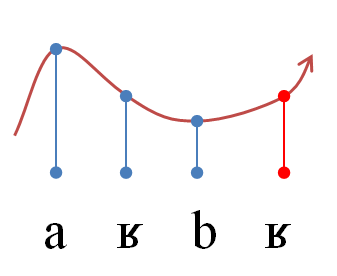 Courbe de sonorité de la syllabe [arbr].